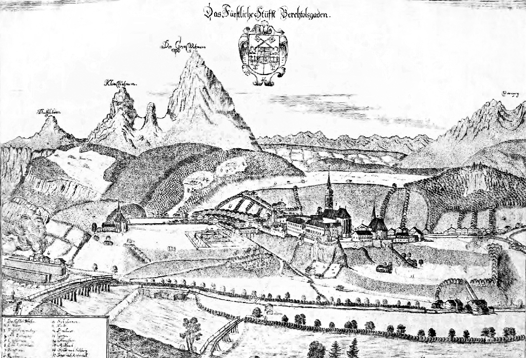 Kupferstich: Das Fürstliche Stüfft Berchtolsgaden.